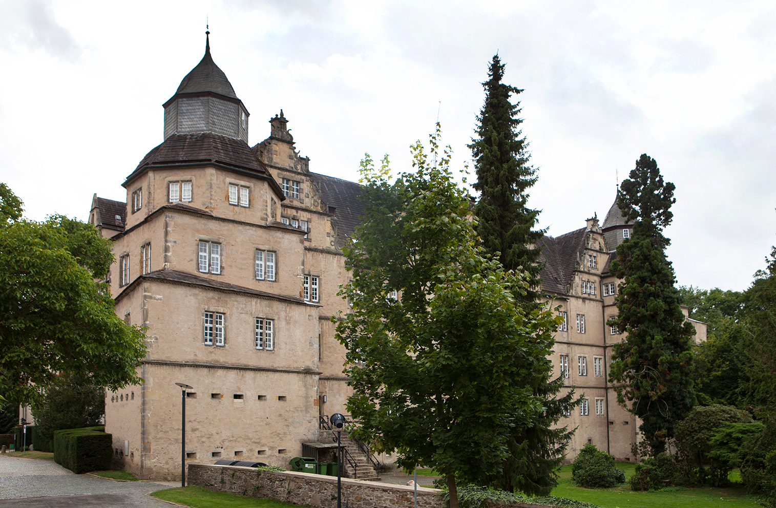 Schloss Varenholz, Ansicht von Nord-Ost This is the photograph of an architectural monument. It is part of the list of cultural monuments of Kalletal, no. 1